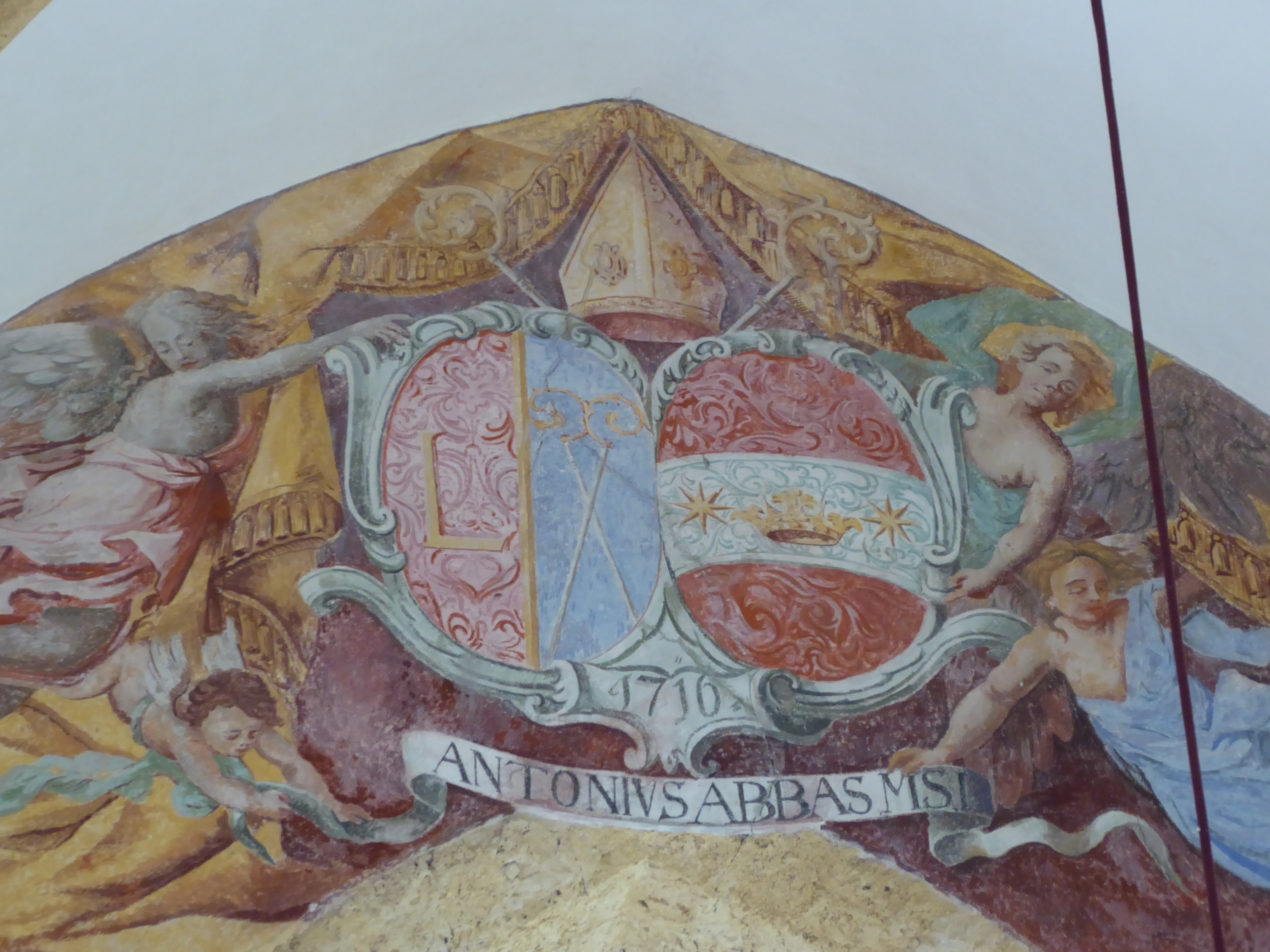 Filialkirche St. Leonhard, Seewiesen, Turnau, Steiermark, Österreich - Wappenmalerei an der Langhausstirnwand (bez. 1716), Abt Anton Stroz, St. Lambrecht